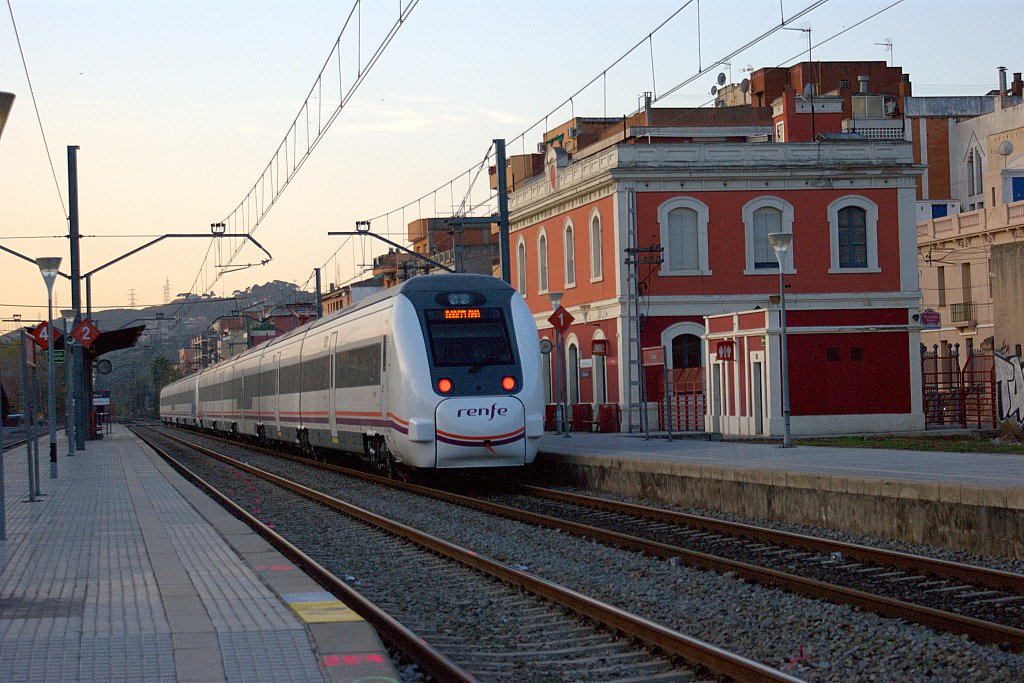 Amb els primers raigs de llum del dia, una unitat 449 en doble fa aturada a passa per l'estació de Montcada i Reixac.